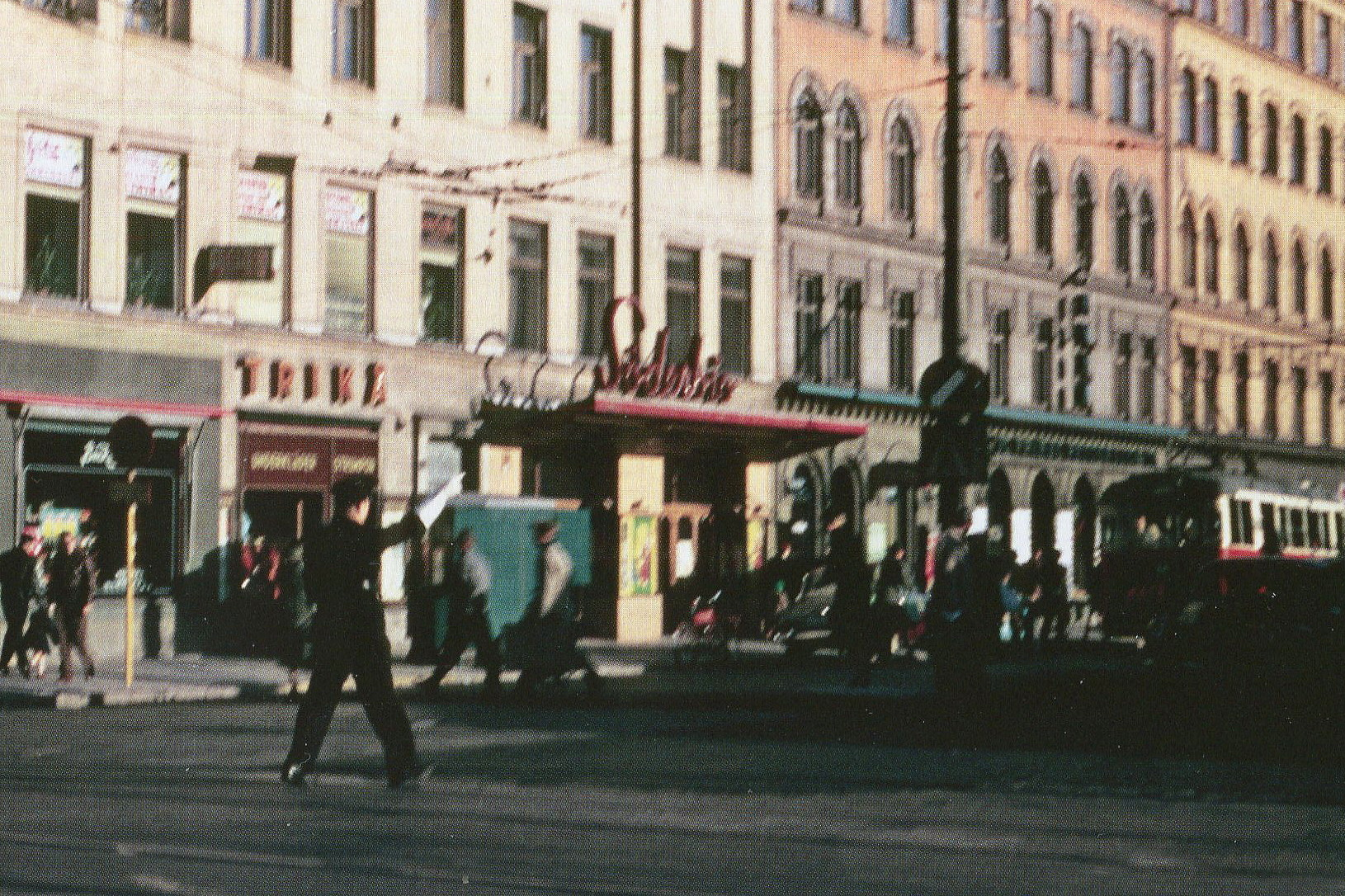 Götgatan 73 med Söderbiograf